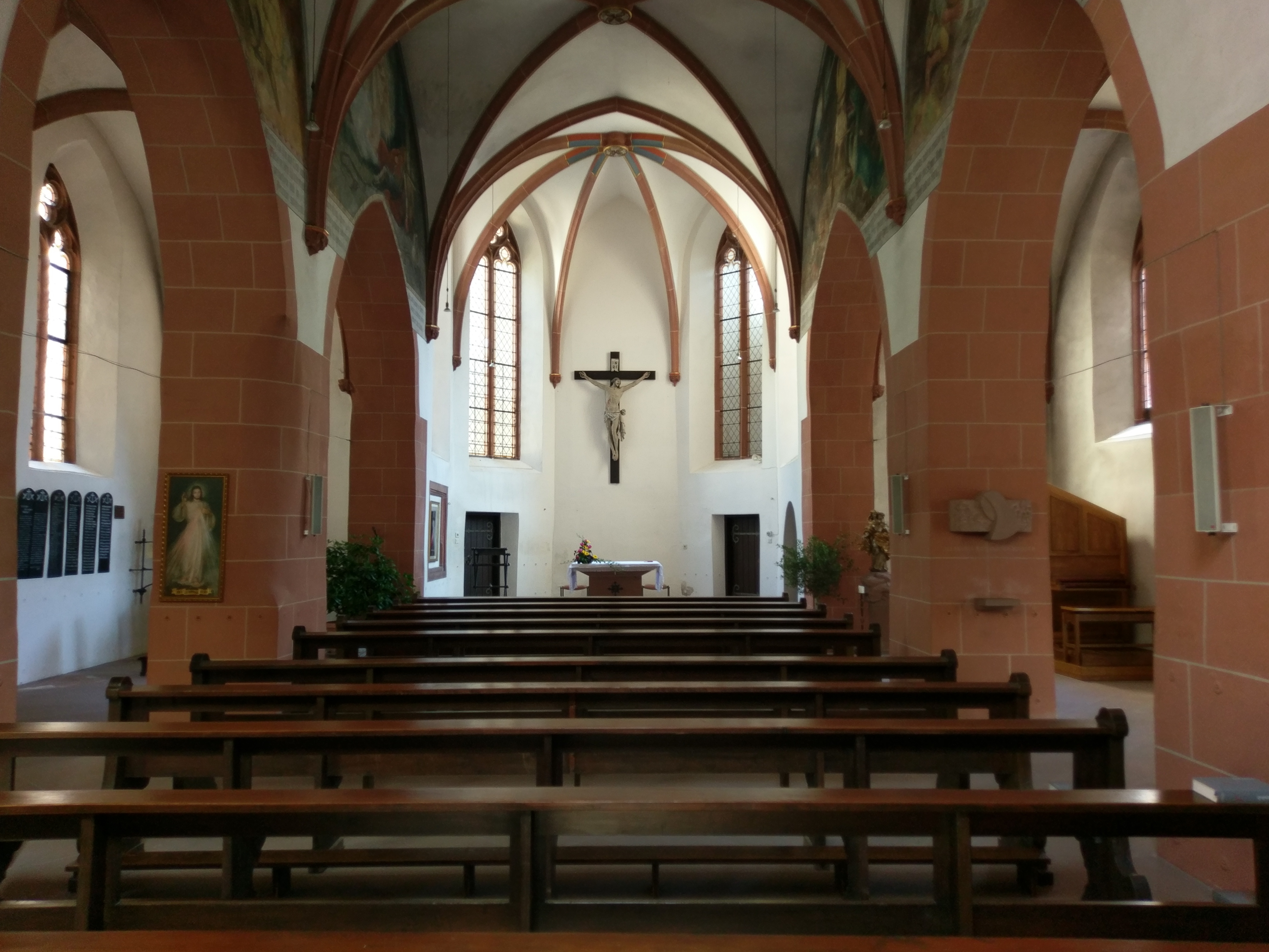 Klosterkirche Kloster Nothgottes. Dreischiffige, gotische Staffelkirche, entstanden um 1390. Eibingen, Rüdesheim am Rhein.